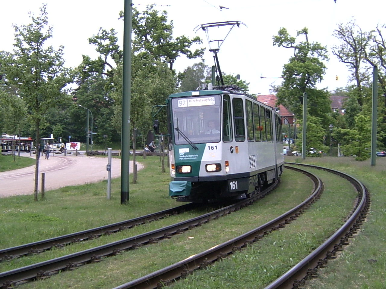 Schwungvoll legt sich ein Potsdamer Kt4Dm-Zweiwagenzug in die lange Kurve zwischen den Haltestellen Am Schragen und Puschkinallee. Tw 161 ist einer der am letzten modernisierten Kt4Dm, die trotz der Niederflurbahnen noch immer die Hauptlast bei der Potsdamer Straßenbahn tragen. Dieser westliche Abschnitt der Kurve wird als "Käferkurve" bezeichnet, weil das im Hintergrund (rechts) sichtbare Gehörlz wegen einer seltenen Käferart nicht durchfahren werden durfte.